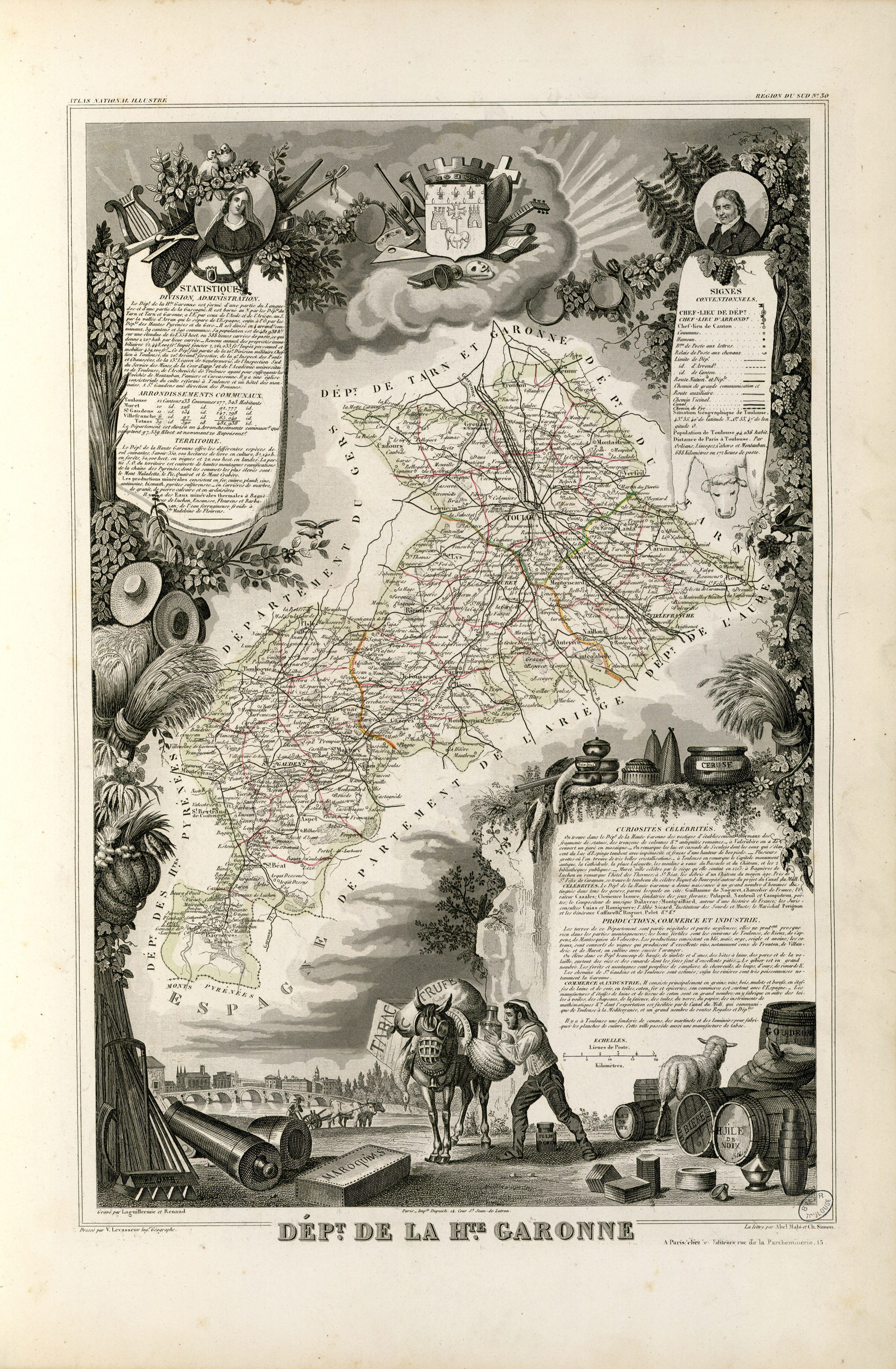 Titre complet du recueil : Atlas national illustré des 86 Départements et des Possessions de la France divisé par Arrondissements, Cantons et Communes avec le tracé de toutes les routes, chemins de fer et canaux. Dressé d'après les Travaux du Cadastre du Dépôt de la Guerre et des Ponts et Chaussées par V. Levasseur, Ingénieur Géographe attaché au Génie du Cadastre et de la Ville de Paris. Gravé sur acier par les meilleurs artistes. Imprimerie de Lemercier à Paris ou imprimerie Dupuich à Paris. Page de titre et 100 pl. en n. et b. et en coul. dont un tableau statistique et 2 cartes dépliantes. Ancely, René (1876 - 1966). Possesseur